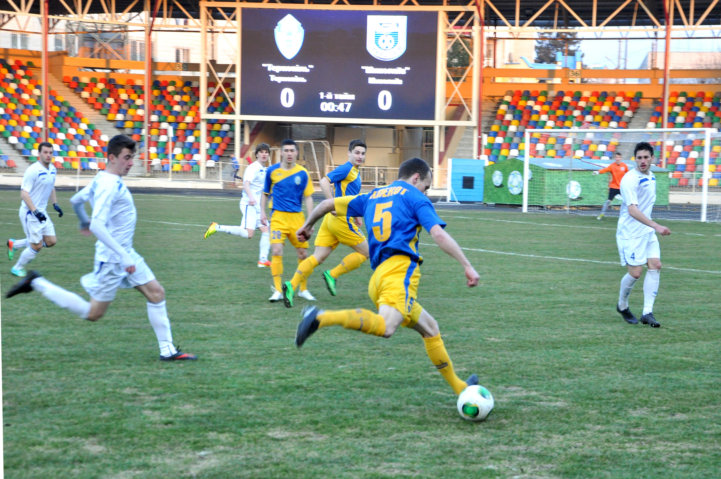 Матч 18-го туру чемпіонату України з футболу 2014—2015: перша ліга між ФК «Тернопіль» та МФК «Миколаїв» на тернопільському міському стадіоні 20 березня 2015 року.